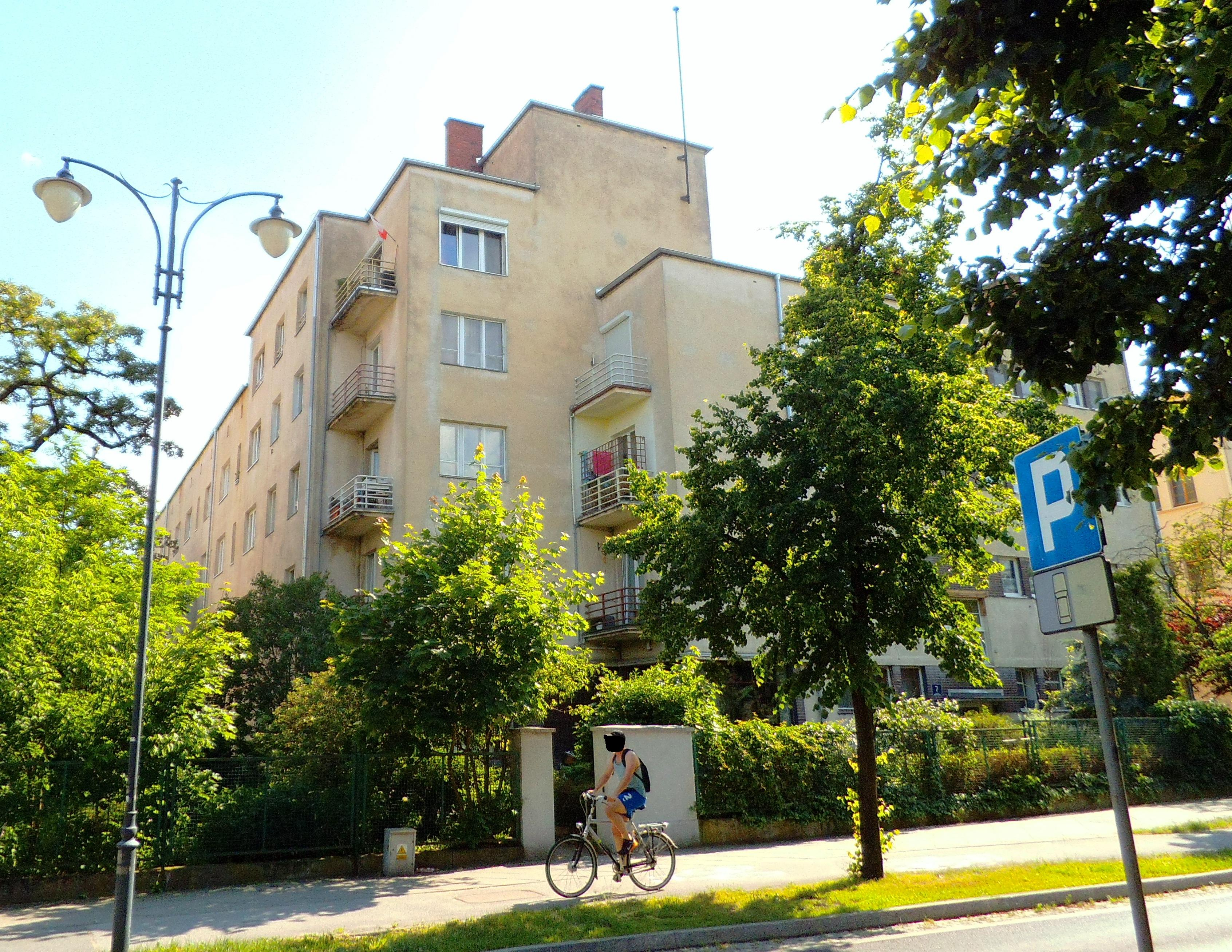 Budynek przy ul. Mickiewicza 7 w Toruniu